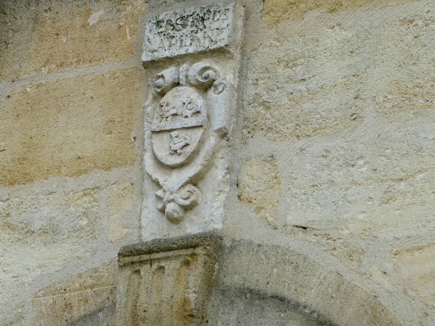 Eysines, Blason Gratian de Mullet, fils d’un conseiller au parlement de Bordeaux : trois canards.